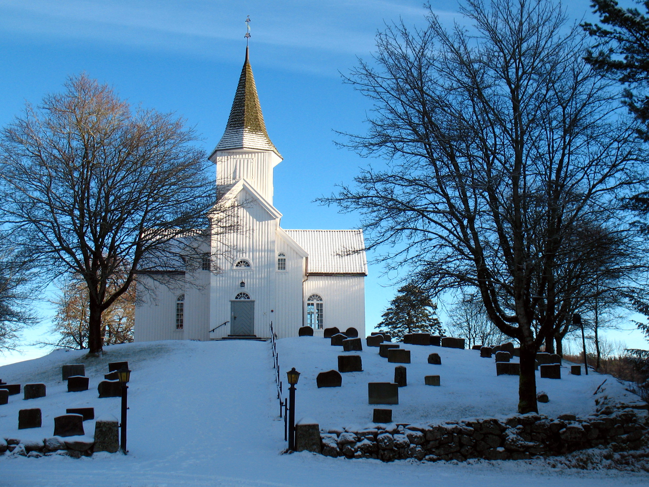 Øvrebø kirke er en korskirke i tre fra 1800 på Øvrebø i Vennesla kommune, Vest-Agder. Den brukes av Øvrebø menighet som er en del av Vennesla fellesråd, Otredal prosti i Agder og Telemark bispedømme. Fra vest.